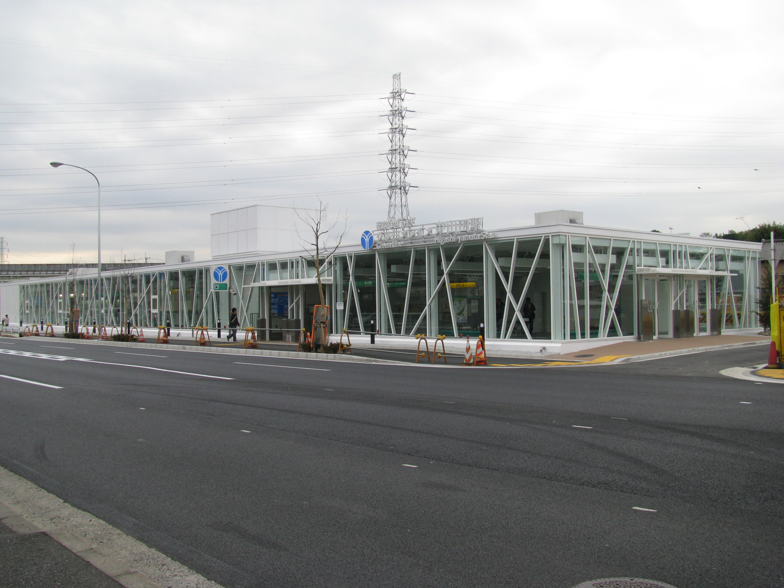 横浜市営地下鉄グリーンライン東山田駅